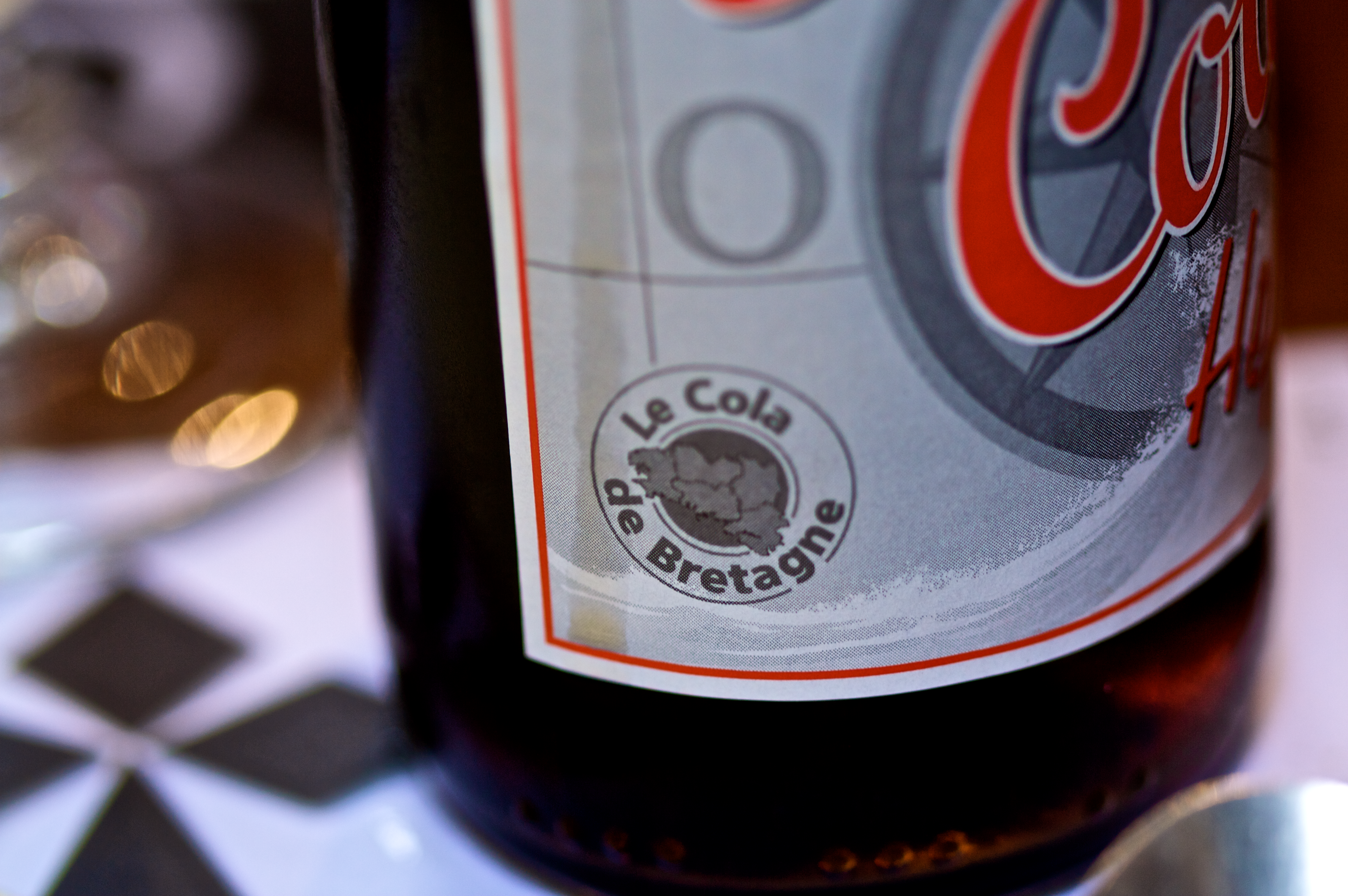 Les bretons ont leur Cola ! "Le cola du Phare Ouest"